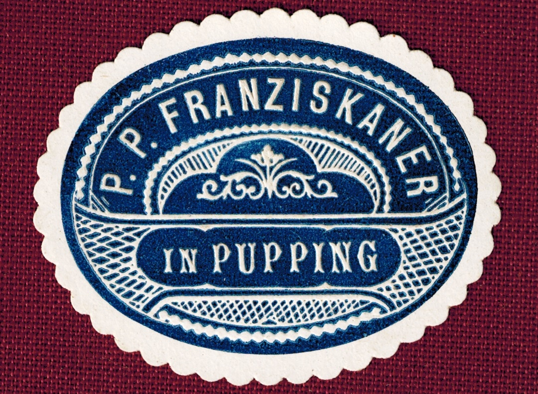 Sello del convento franciscano de Pupping (Austria)